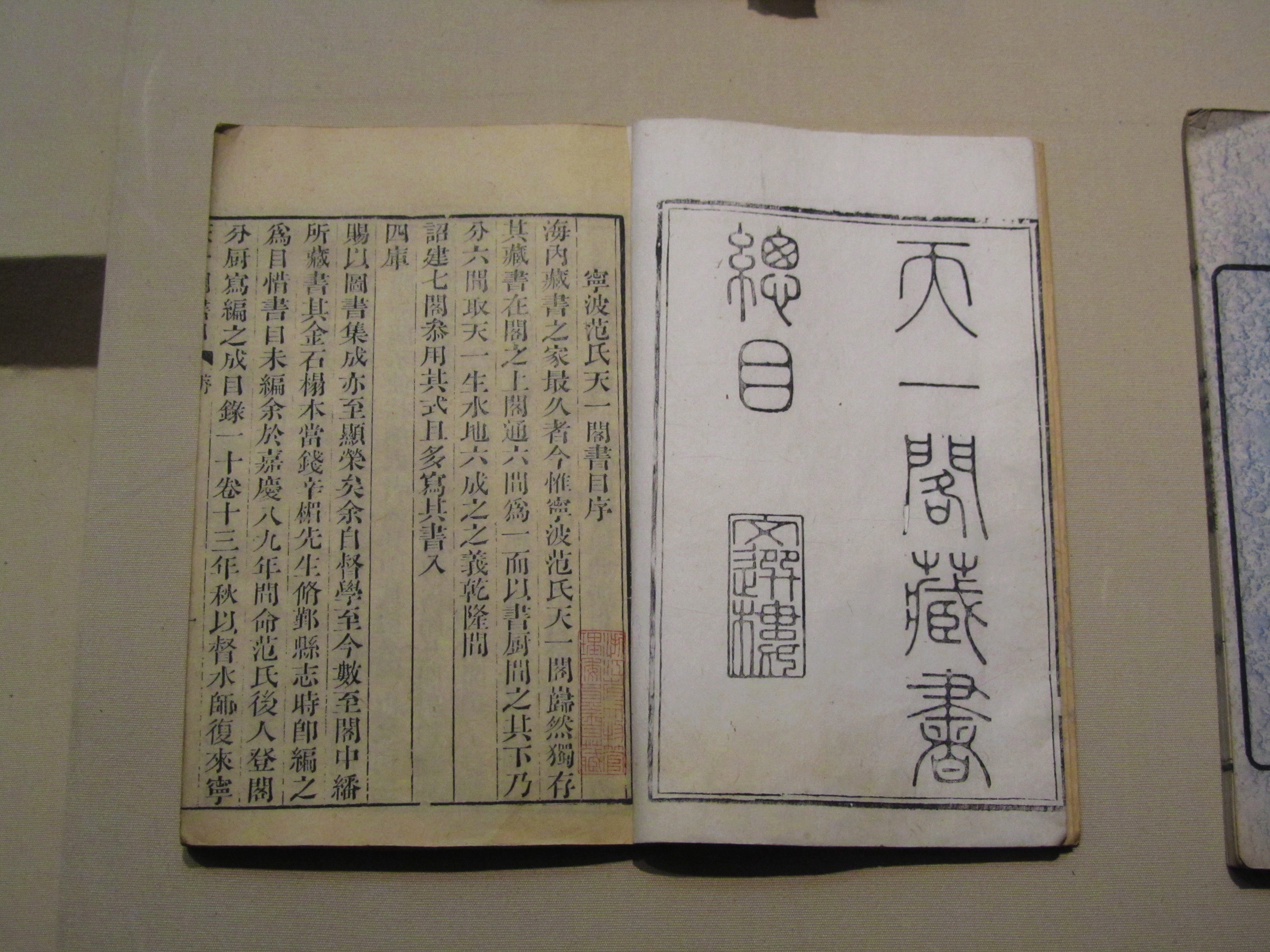 清代范懋柱辑《天一阁藏书总目》，浙江省博物馆武林馆区藏。